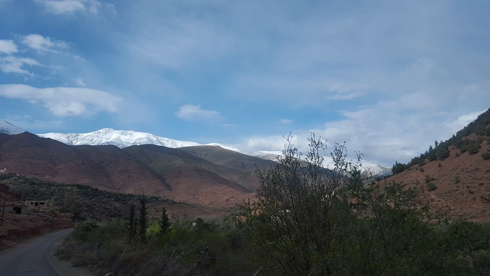 Le massif de Gourza enneigé, vu d'Ifourirn (route d'Ijoukak).